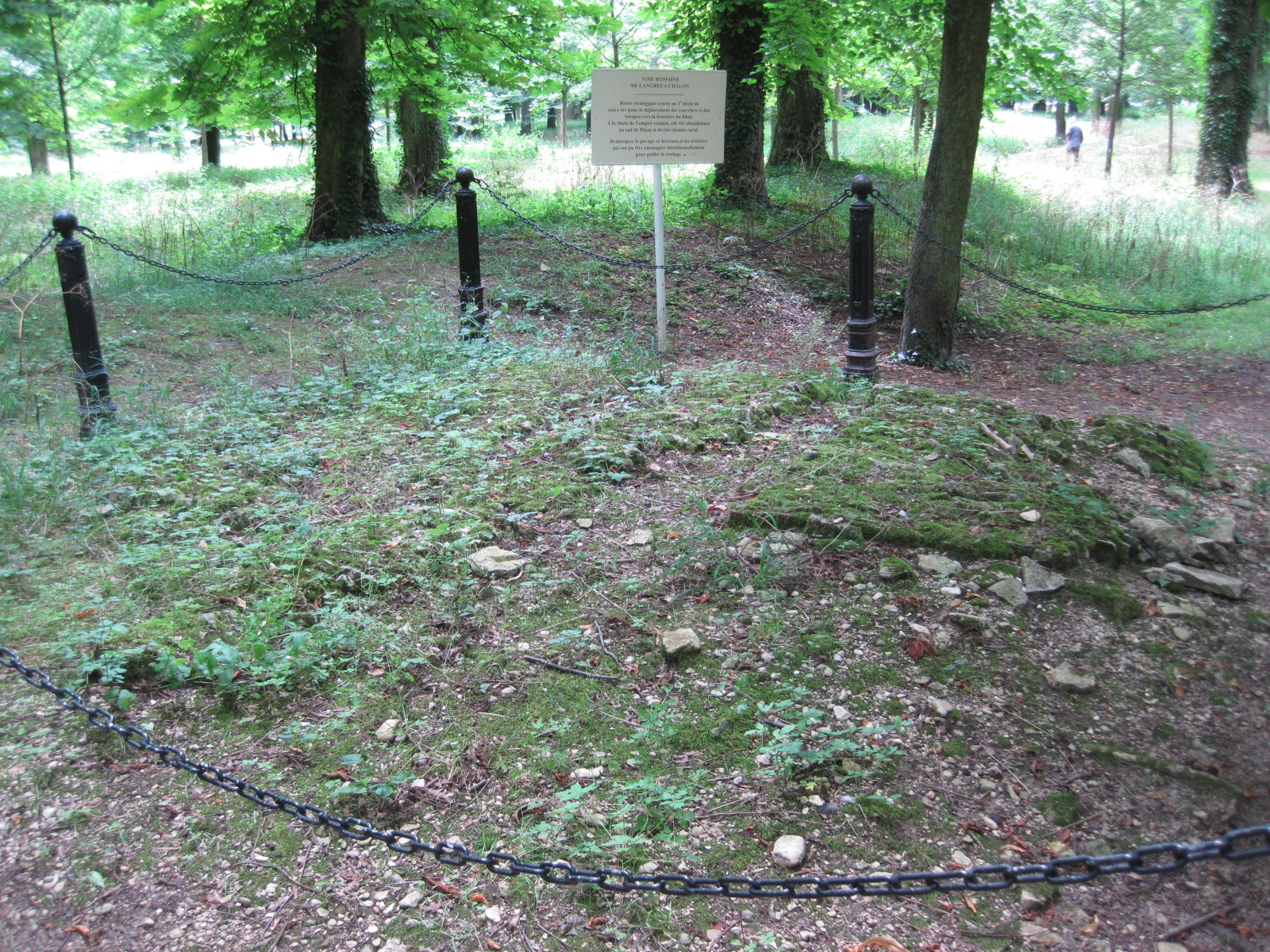 Parc de la Colombière de Dijon en Bourgogne - Vestiges de la voie romaine Agrippa